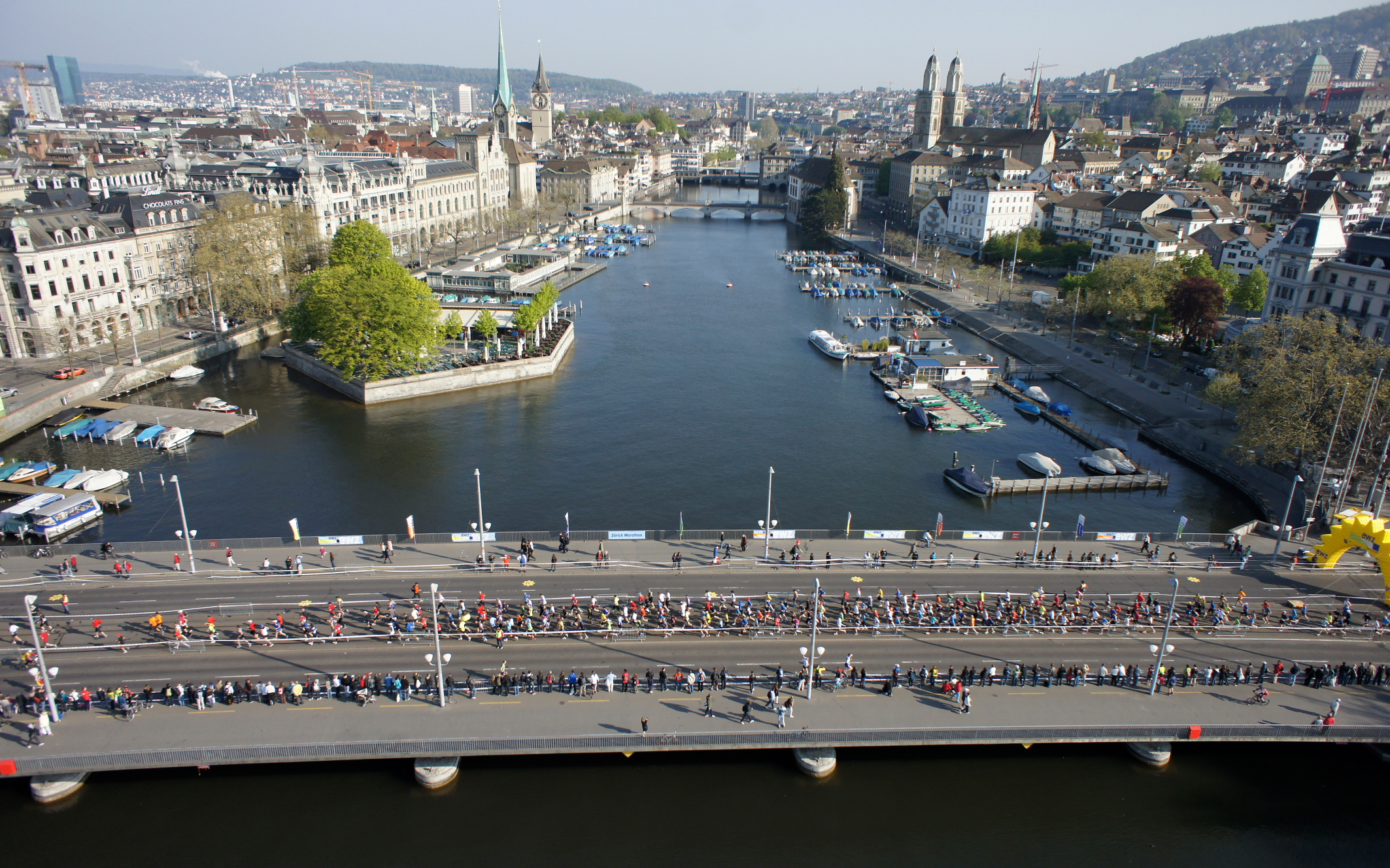 Tausende von Marathon-LäuferInnen spurten über die Quaibrücke am Bellevue